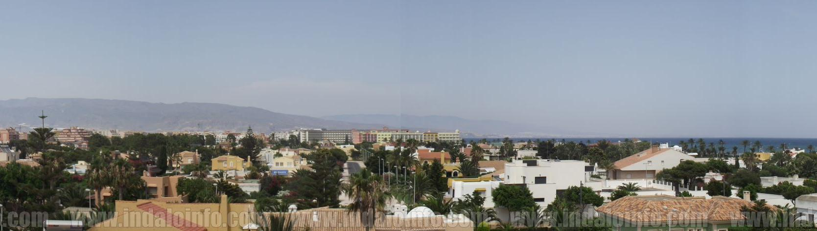 Panorama de Roquetas de Mar